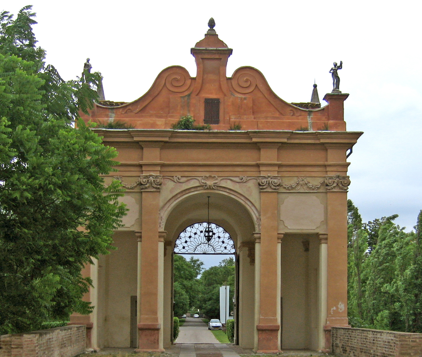 Villa Pallavicino (Arco del Corpo di guardia - lato interno)